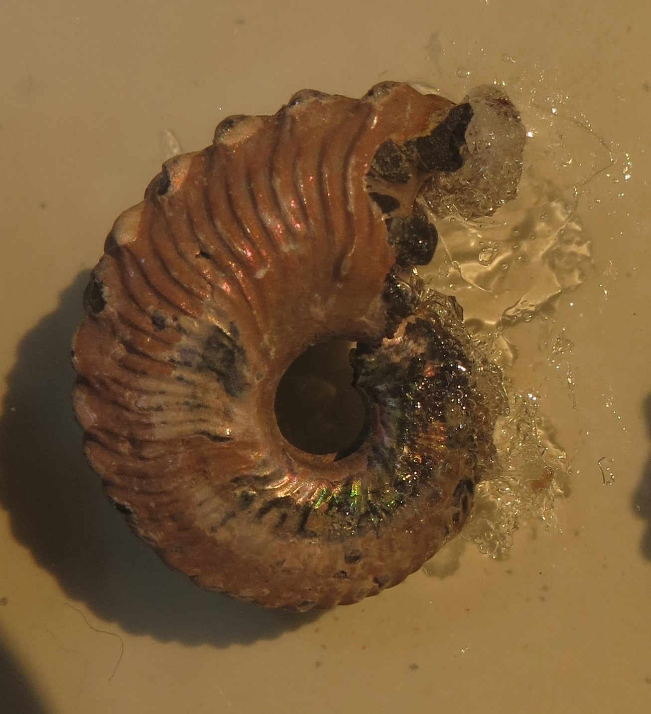 Fossil of Euhoplites - Took the picture at Naturalis, Leiden